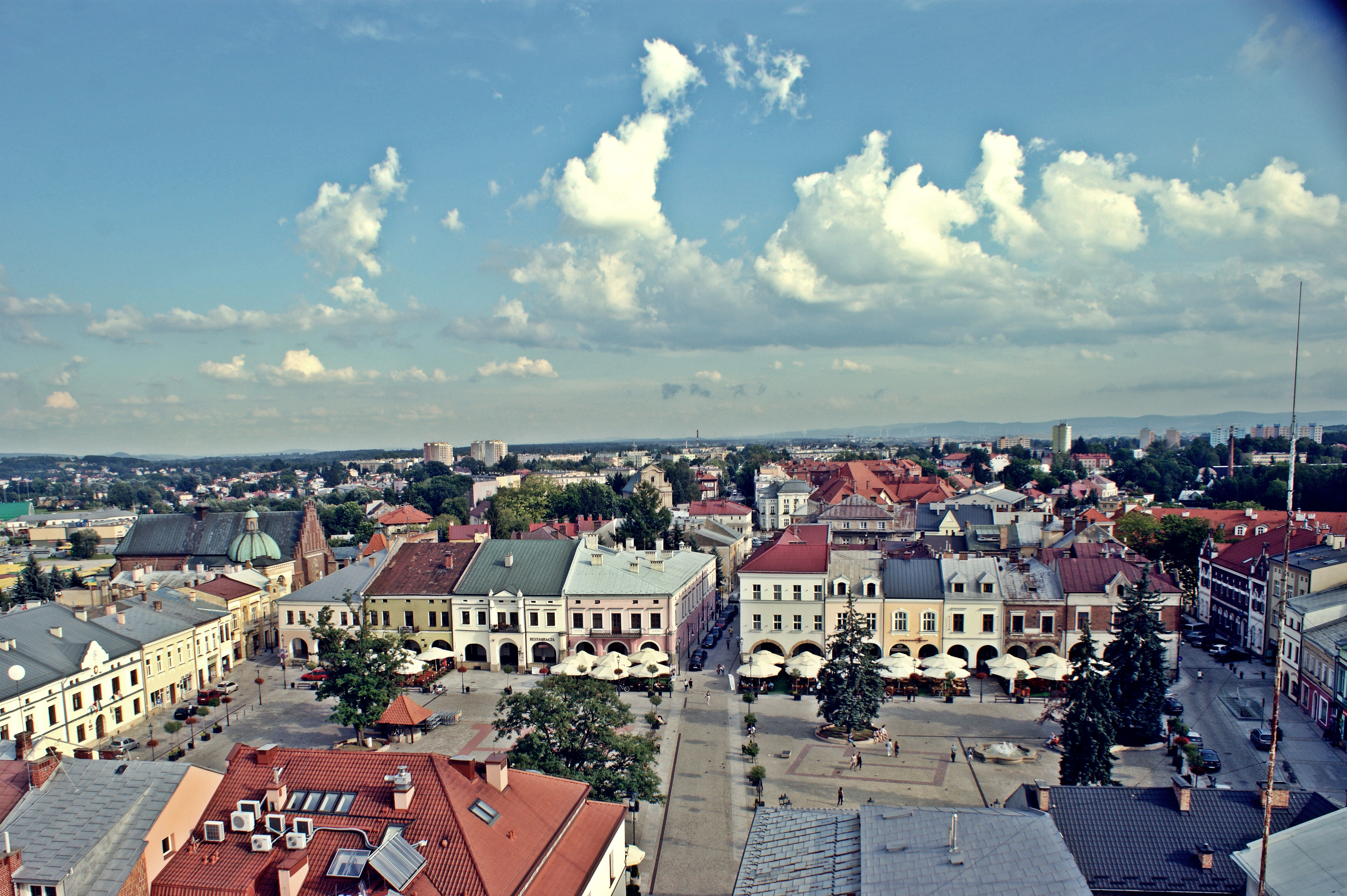 Krosno, historyczny układ urbanistyczny, XIV, XIX/XX